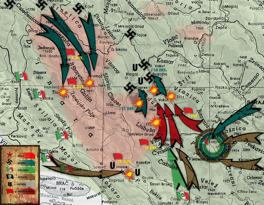 Након неуспеха у нападу на Коњиц, Врховни штаб је донео одлуку о рушењу моста на Неретви и противудару у супротном смеру, према Горњем Вакуфу. Ово наступање трајало је од 3. до 5. фебруара